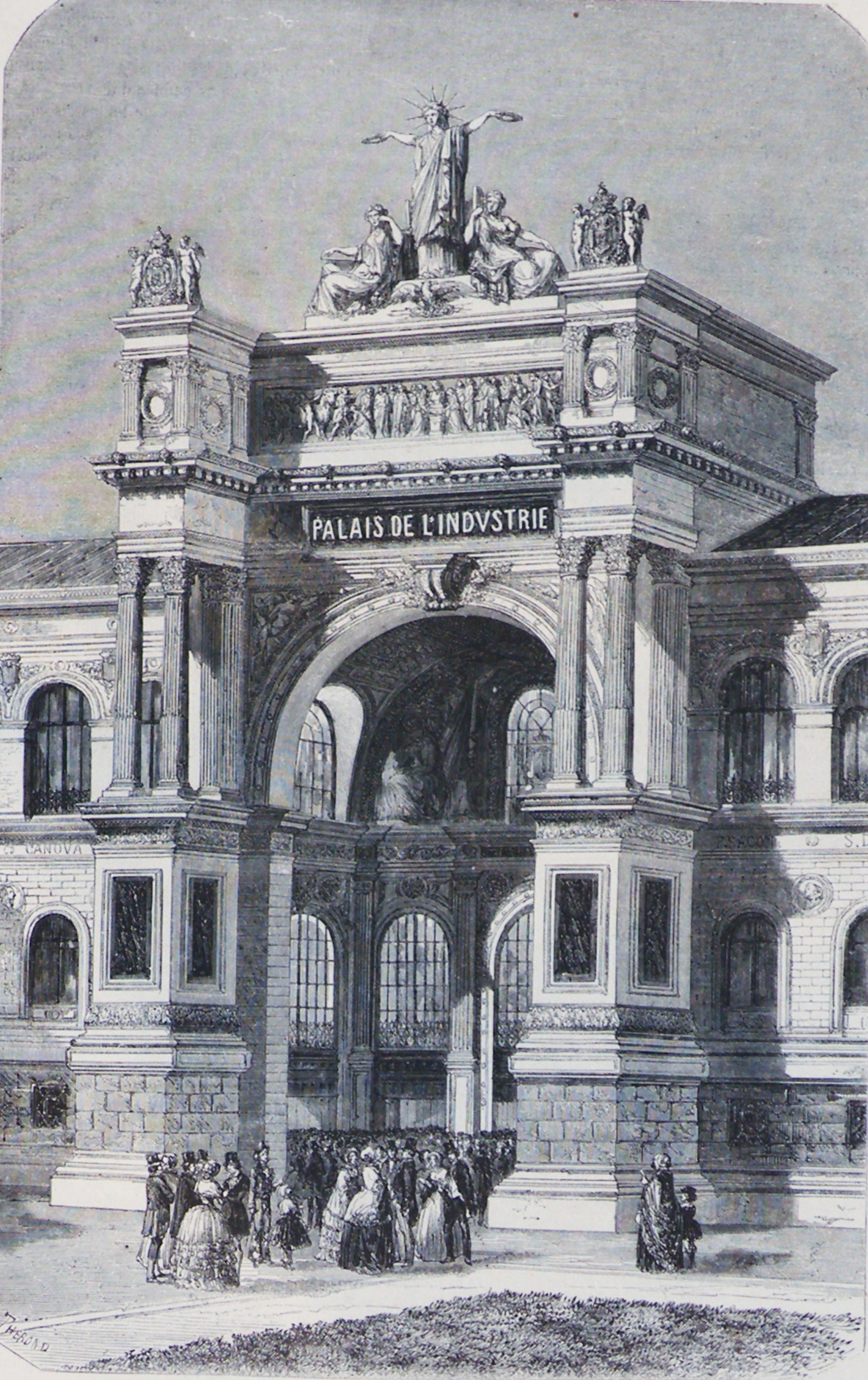 Façade nord du palais de l'Industrie - Exposition universelle 1855